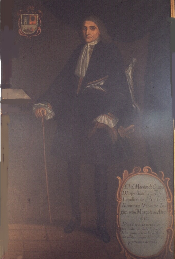 Retrato de Luis Sáenz de Tagle, primer marqués de Altamira (1642-c.1710)